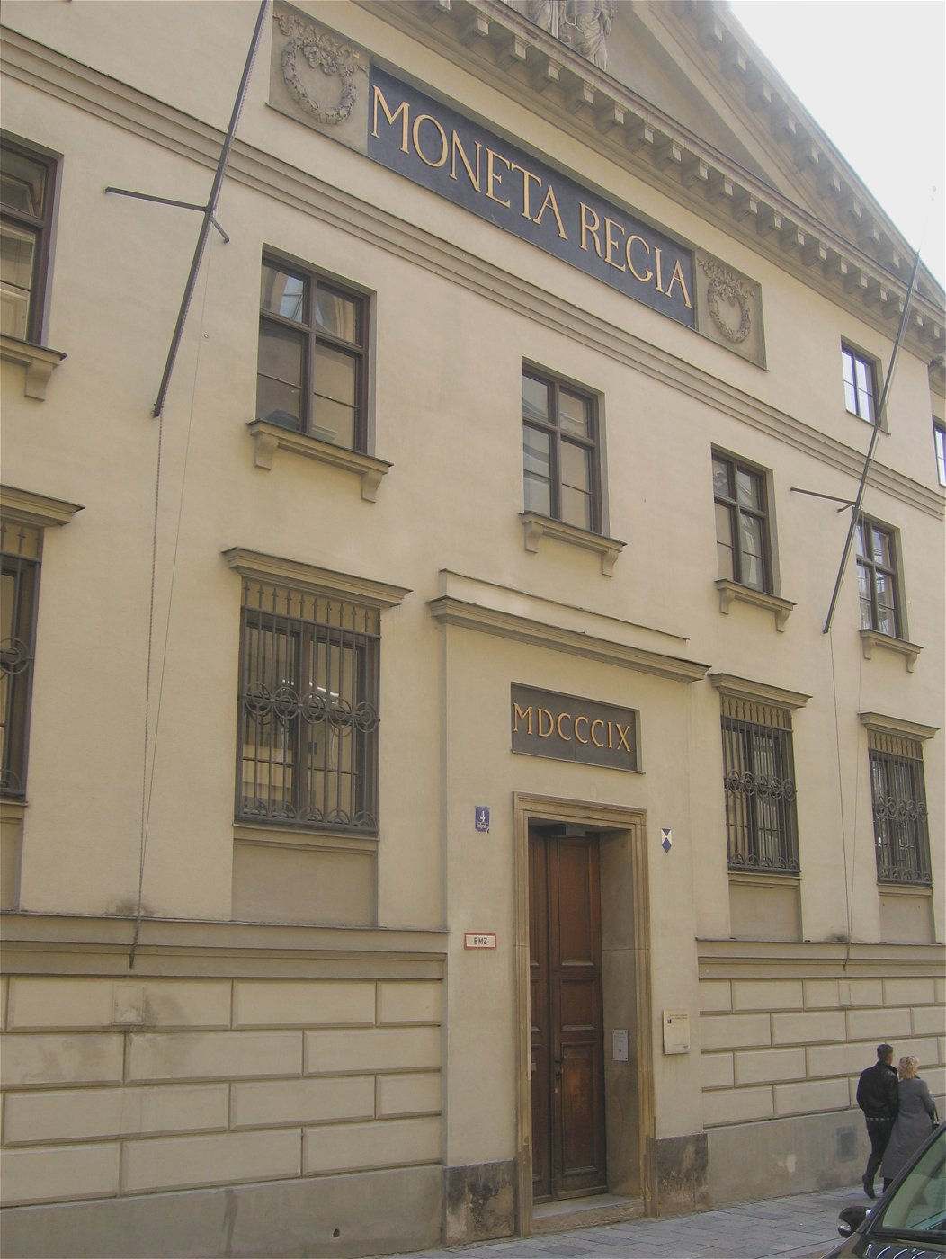 Alte Münze (MONETA REGIA) in München, Hofgraben